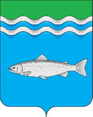 Проект герба Онежского района